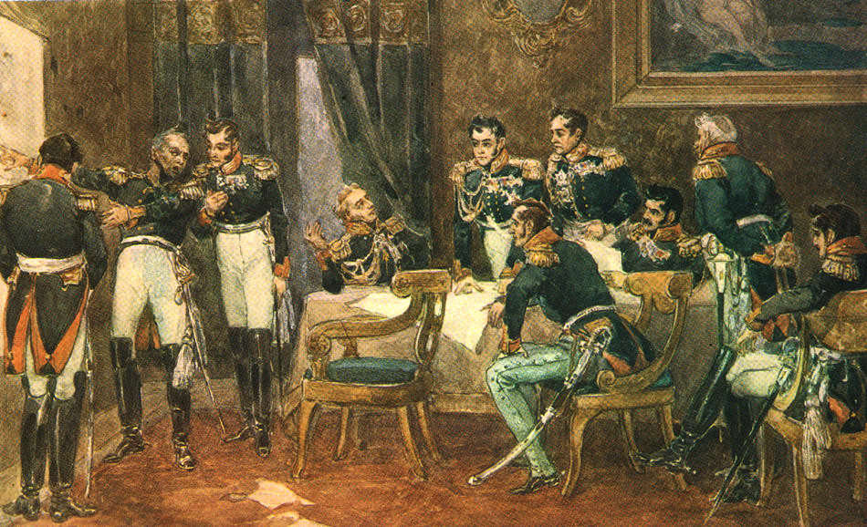 Ваенны савет у Дрысе